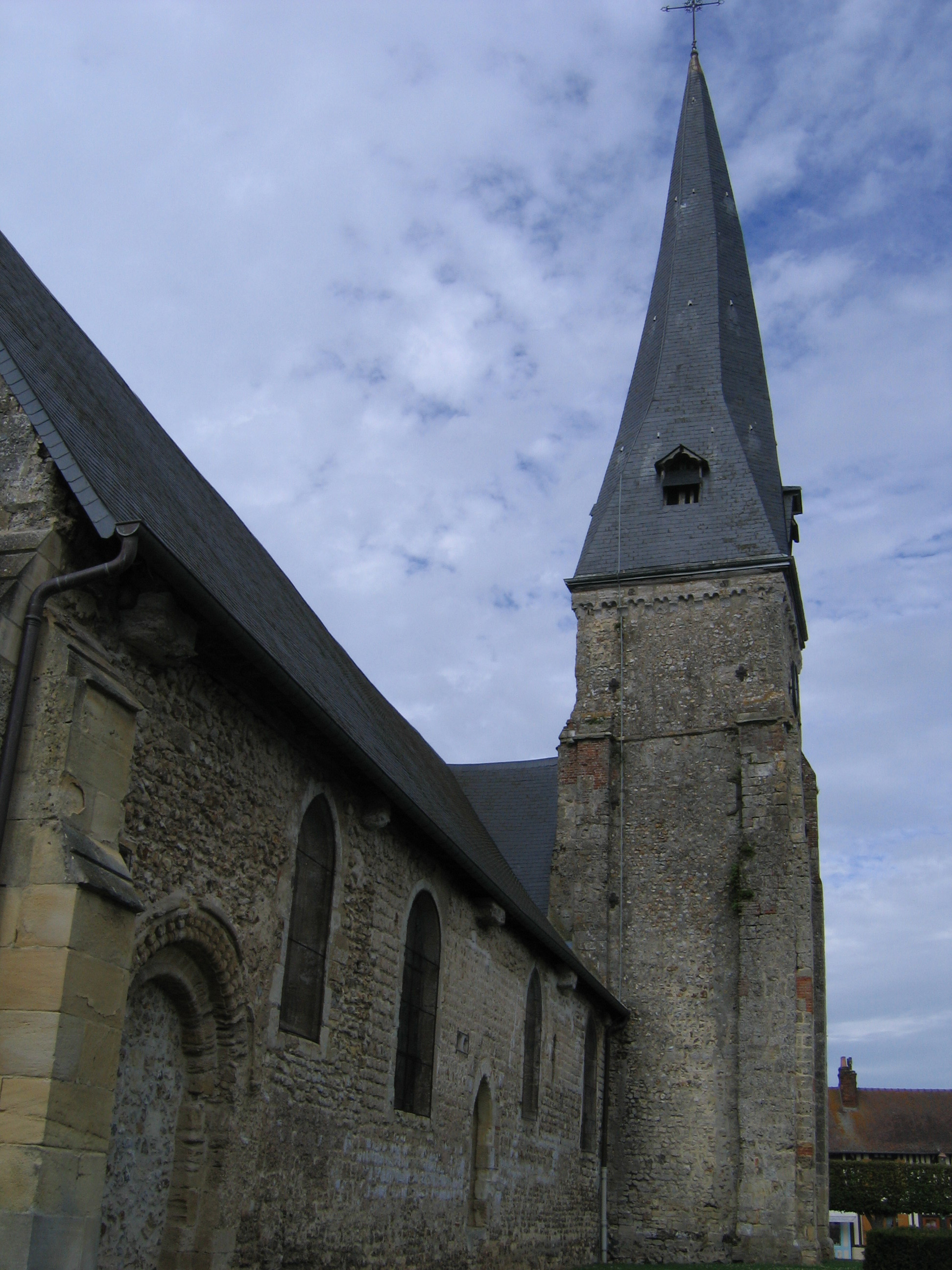 L'église de Moyaux et son fameux clocher tordu.